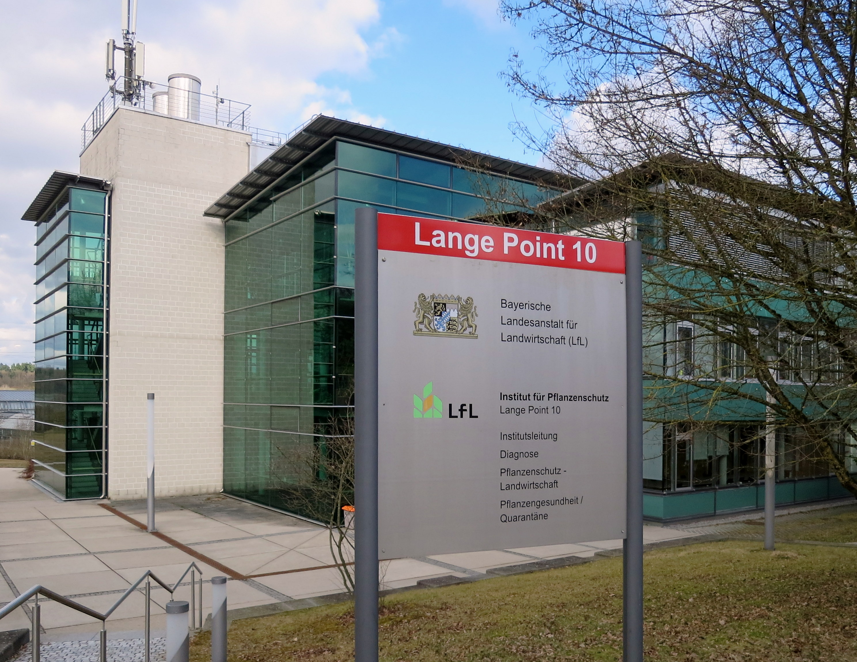 Institutsgebäude der Landesanstalt für Landwirtschaft (LfL)